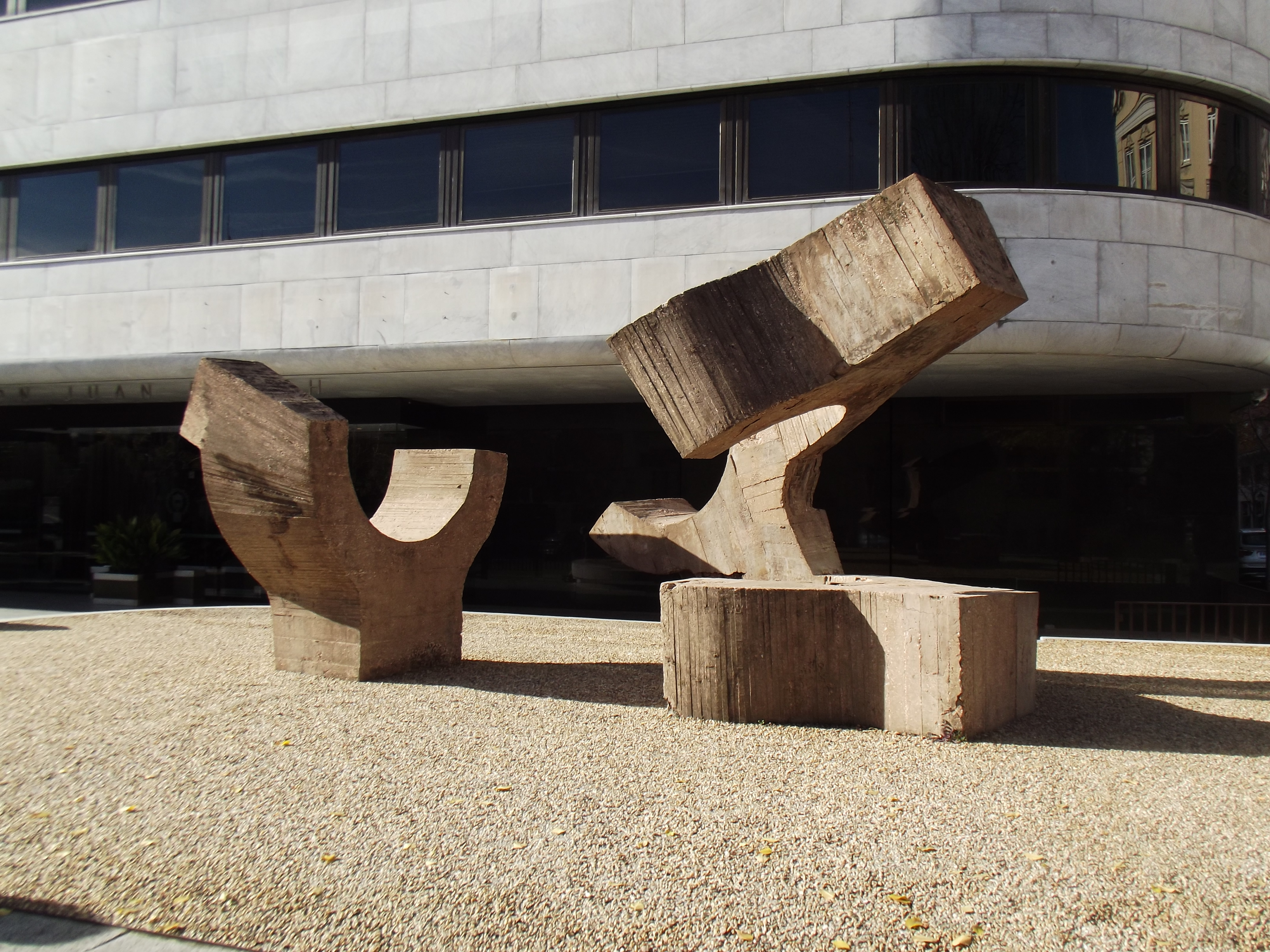 Lugar de Encuentros I de Eduardo Chillida, Madrid.